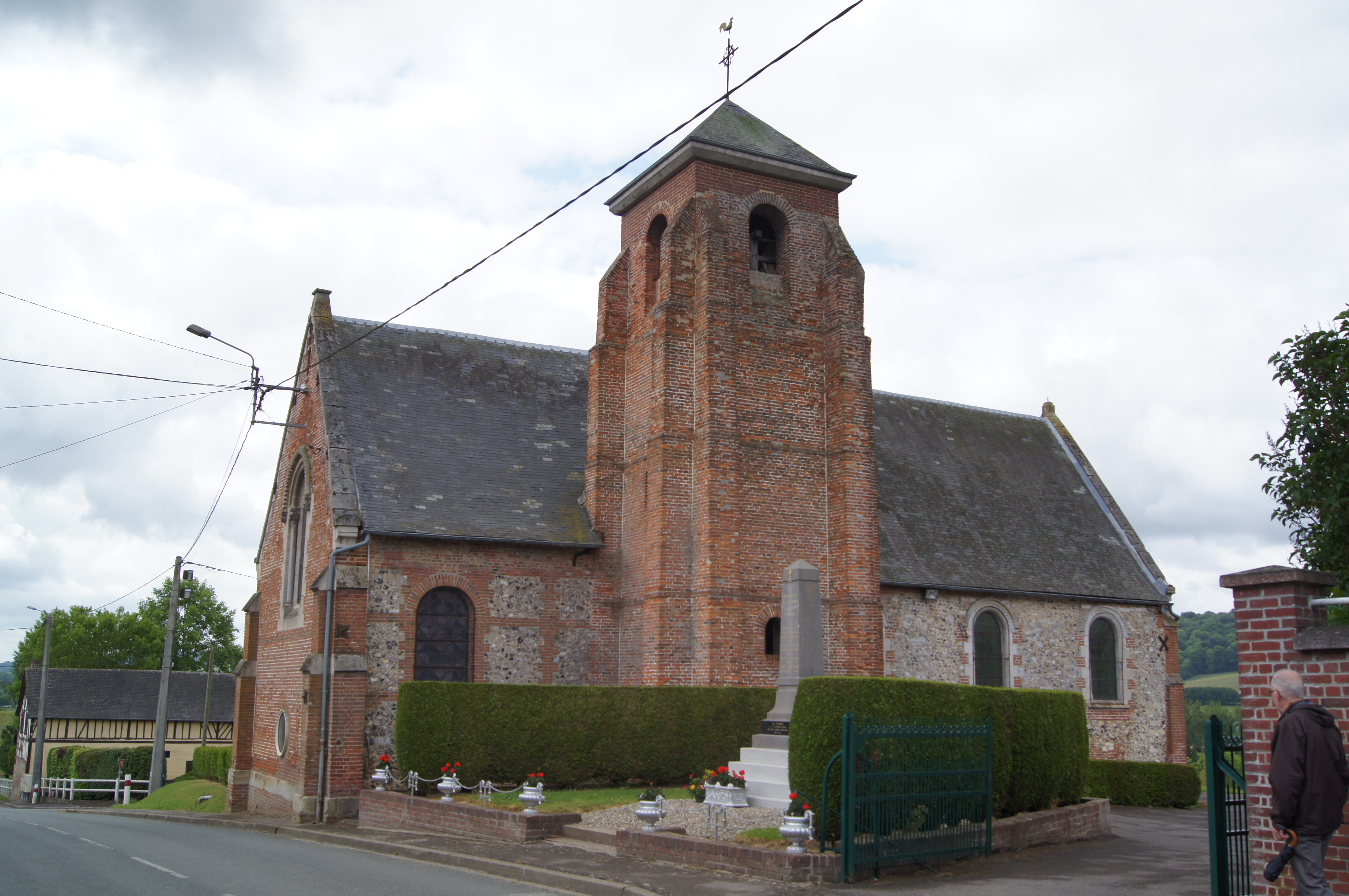 Eglise Saint-Germain de Saint-Germain-sur-Bresle